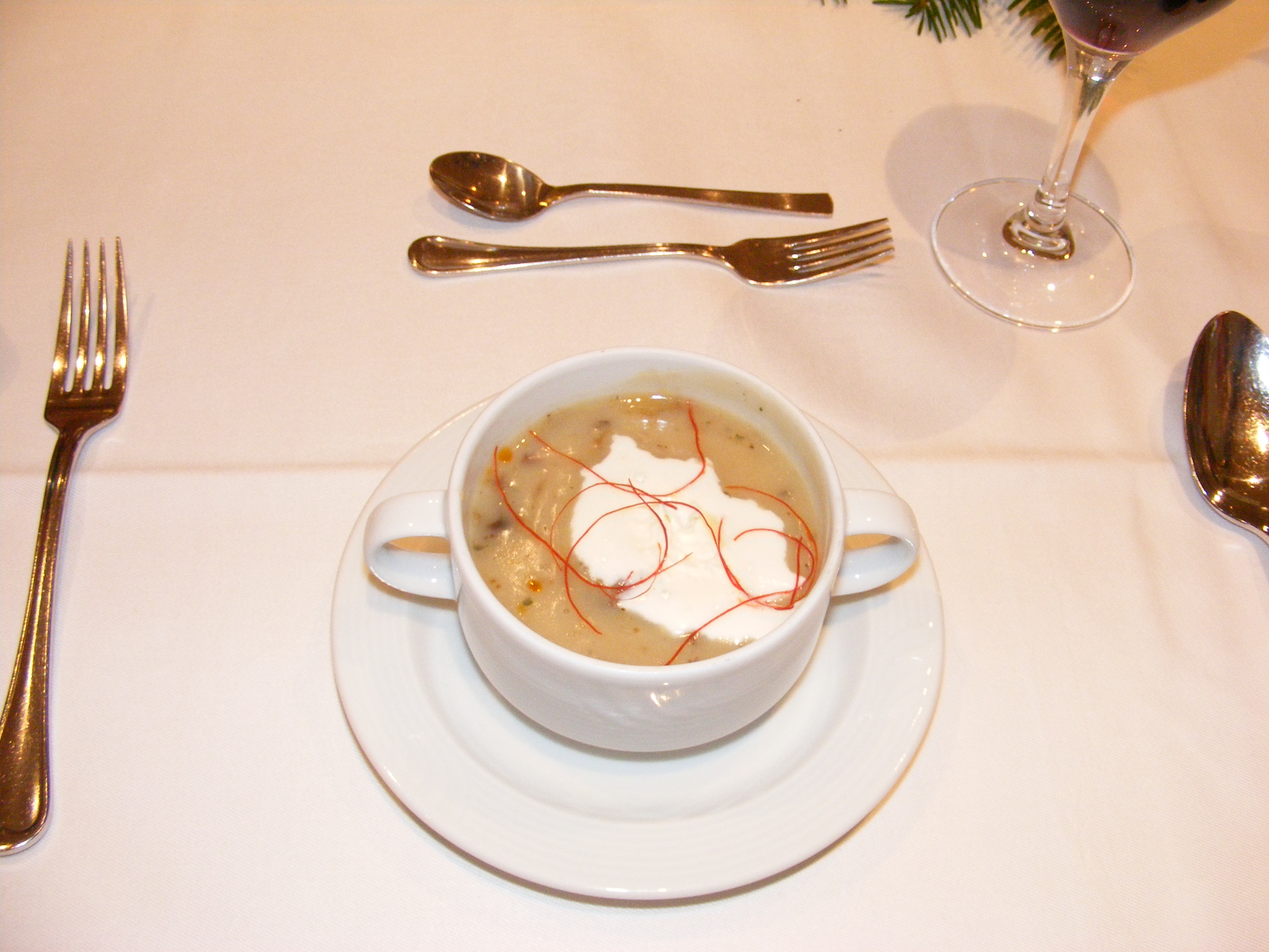 Cappuccino von Waldpilzen mit Chillifäden.